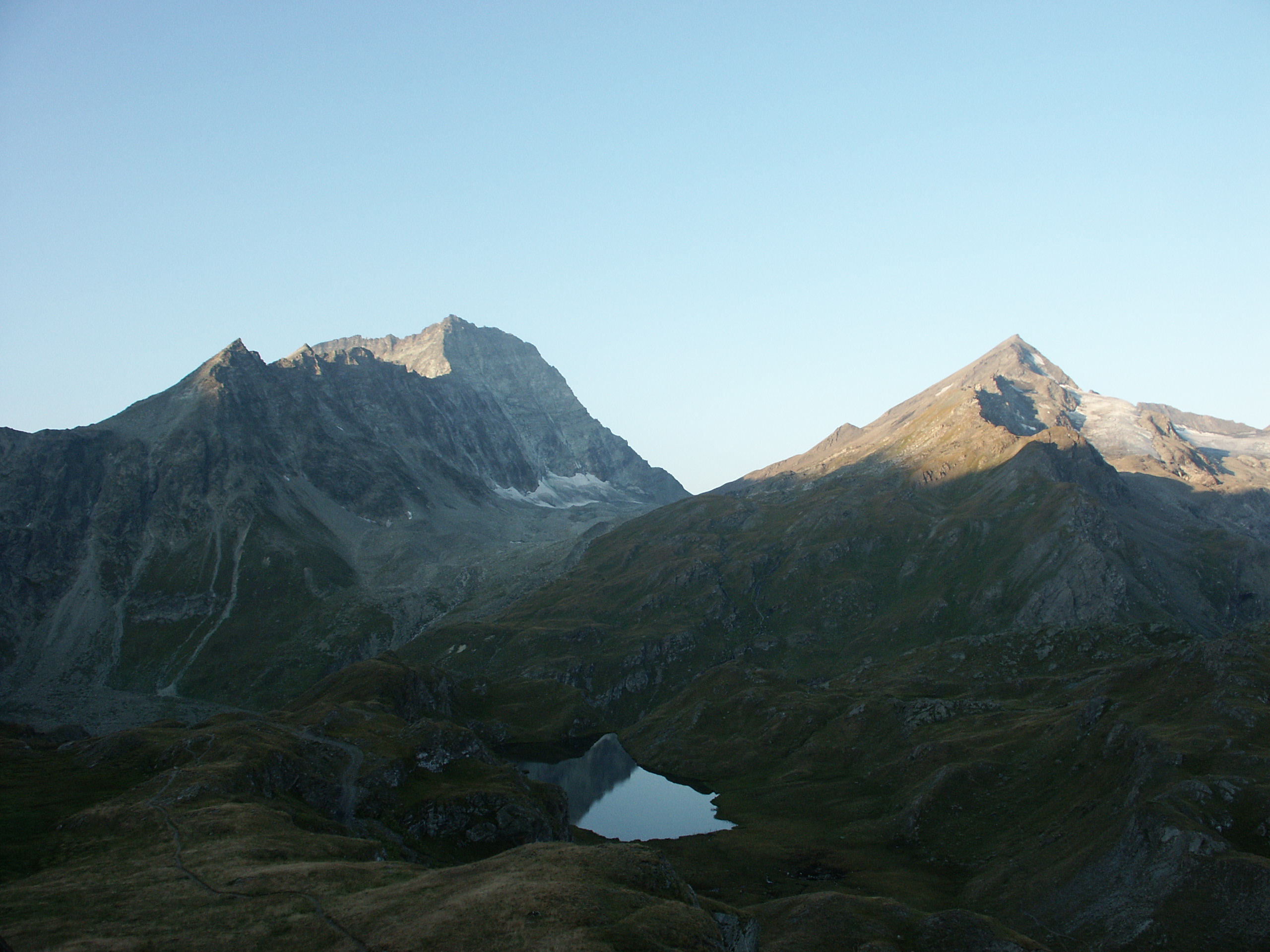 Mont Gelé and Mont Avril, in Bagnes, Valais, Switzerland.